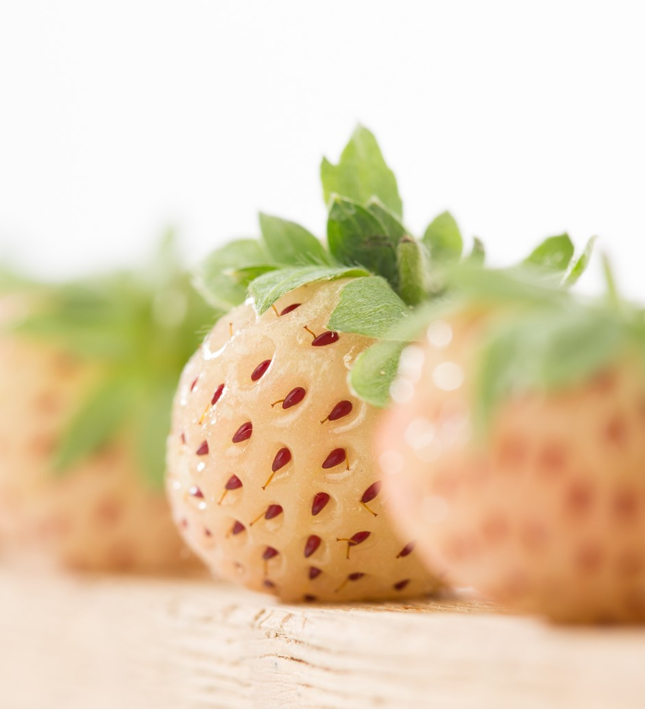 Fragole-ananas